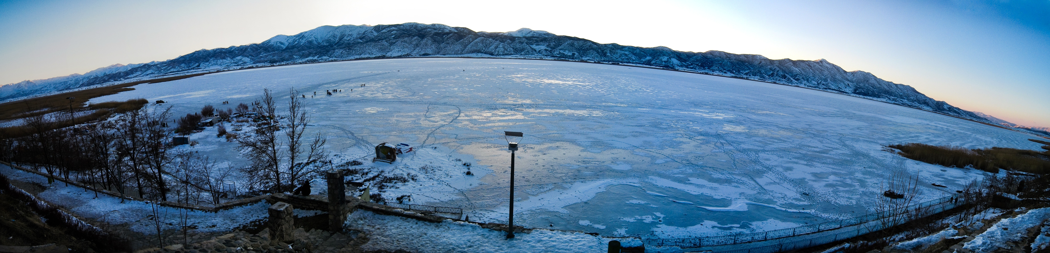 Kurdî: وێنەی پانۆراماییی گۆلی زرێبار لە زستانی ٢٠٠٨دا